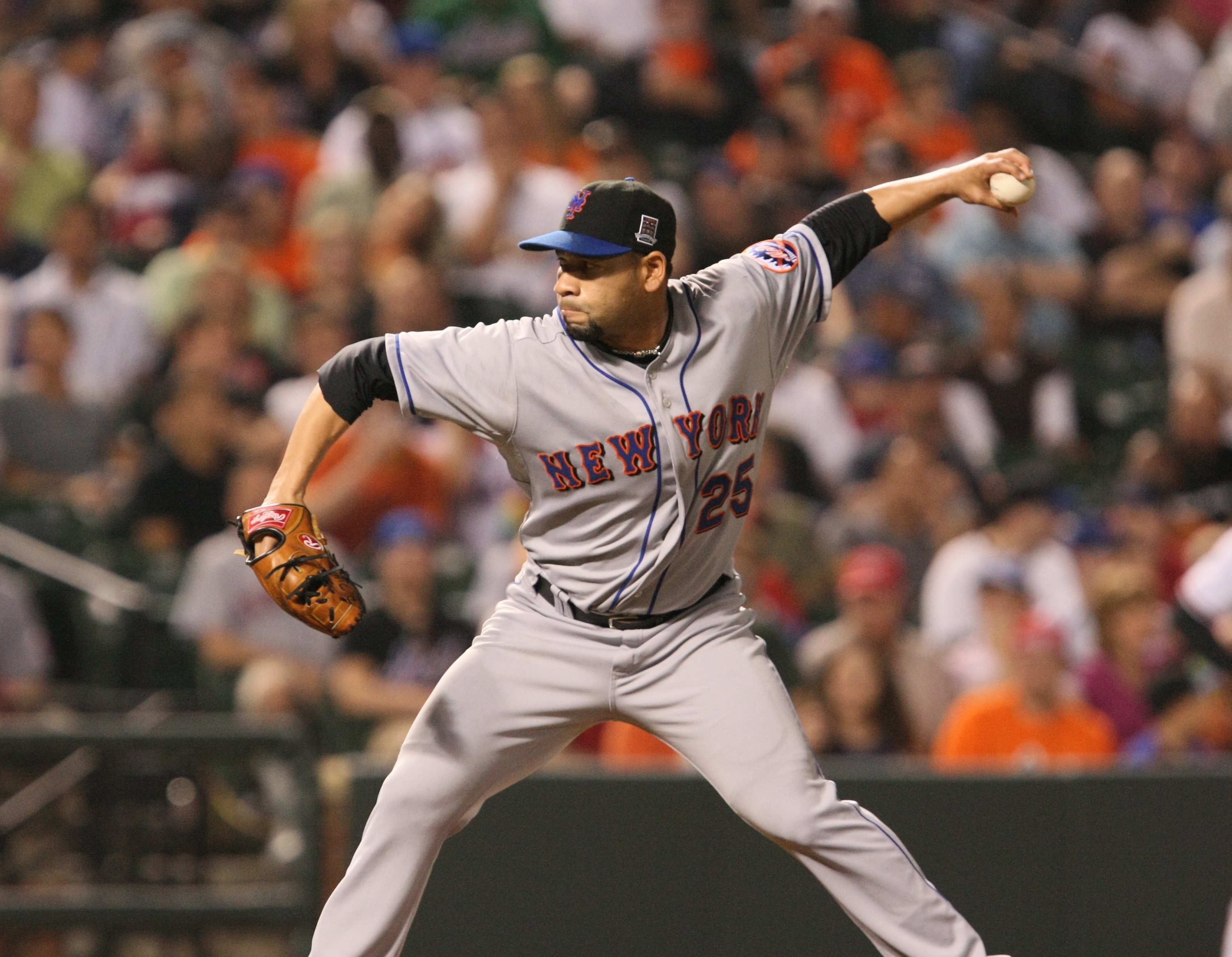 Pedro Feliciano